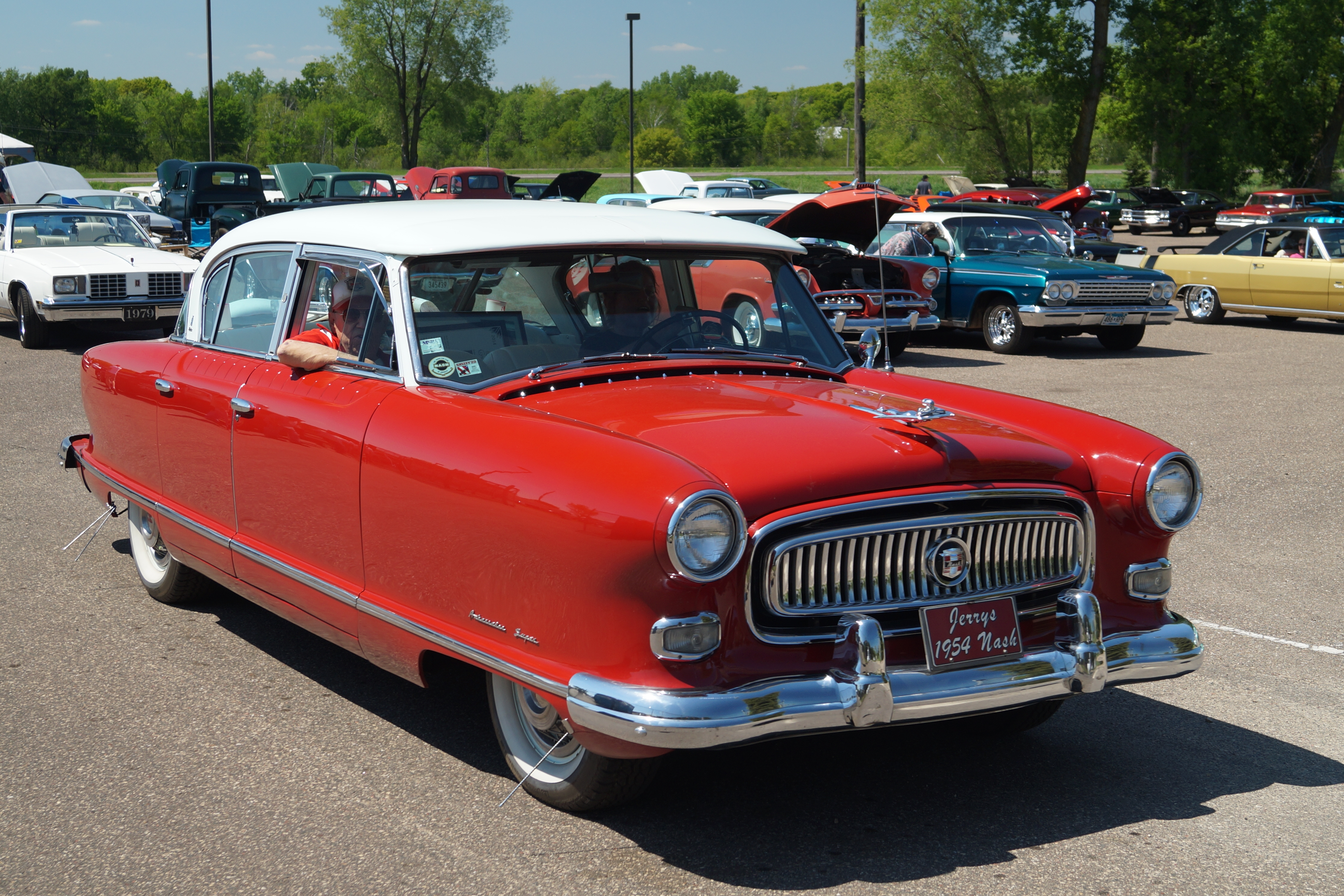 1954 Nash Ambassador Super